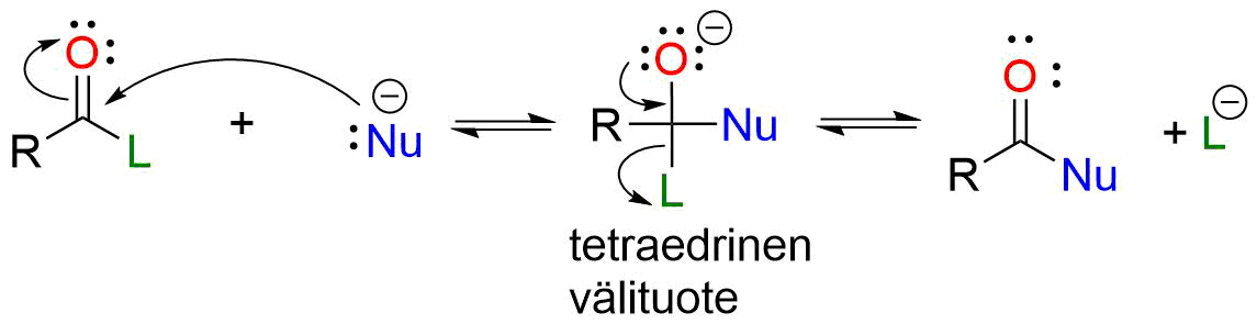 Nukleofiilinen asyylisubstituutioreaktiot, jossa nukleofiili (:Nu–) liittyy karbonyyliryhmään, syntyy tetraedrinen välituote, josta irtoaa lähtevä ryhmä, L– ja muodostuu uusi karbonyyliyhdiste.